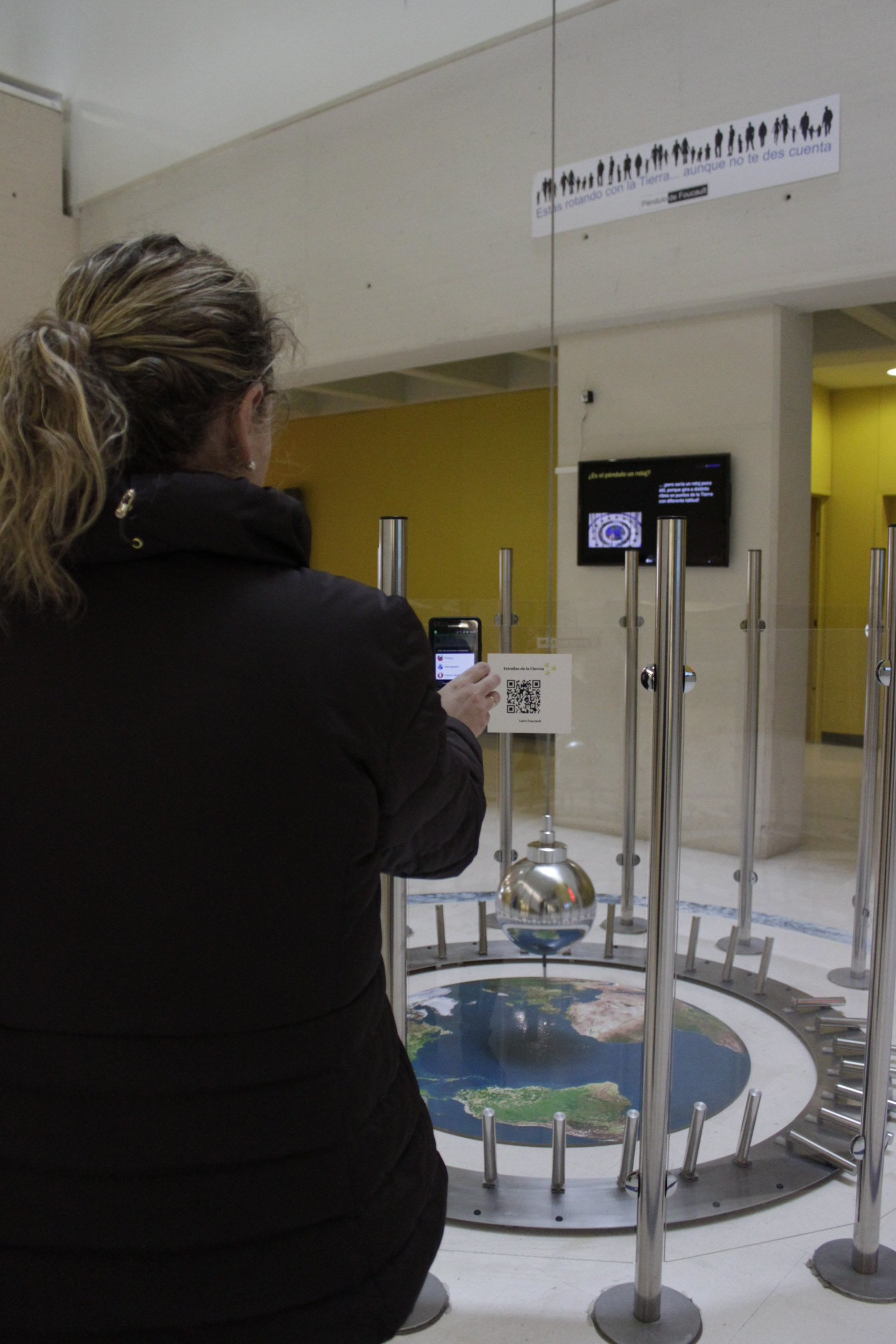 Código Qrpedia (Péndulo de Foucault) instalado en el Museo de la Ciencia de Valladolid